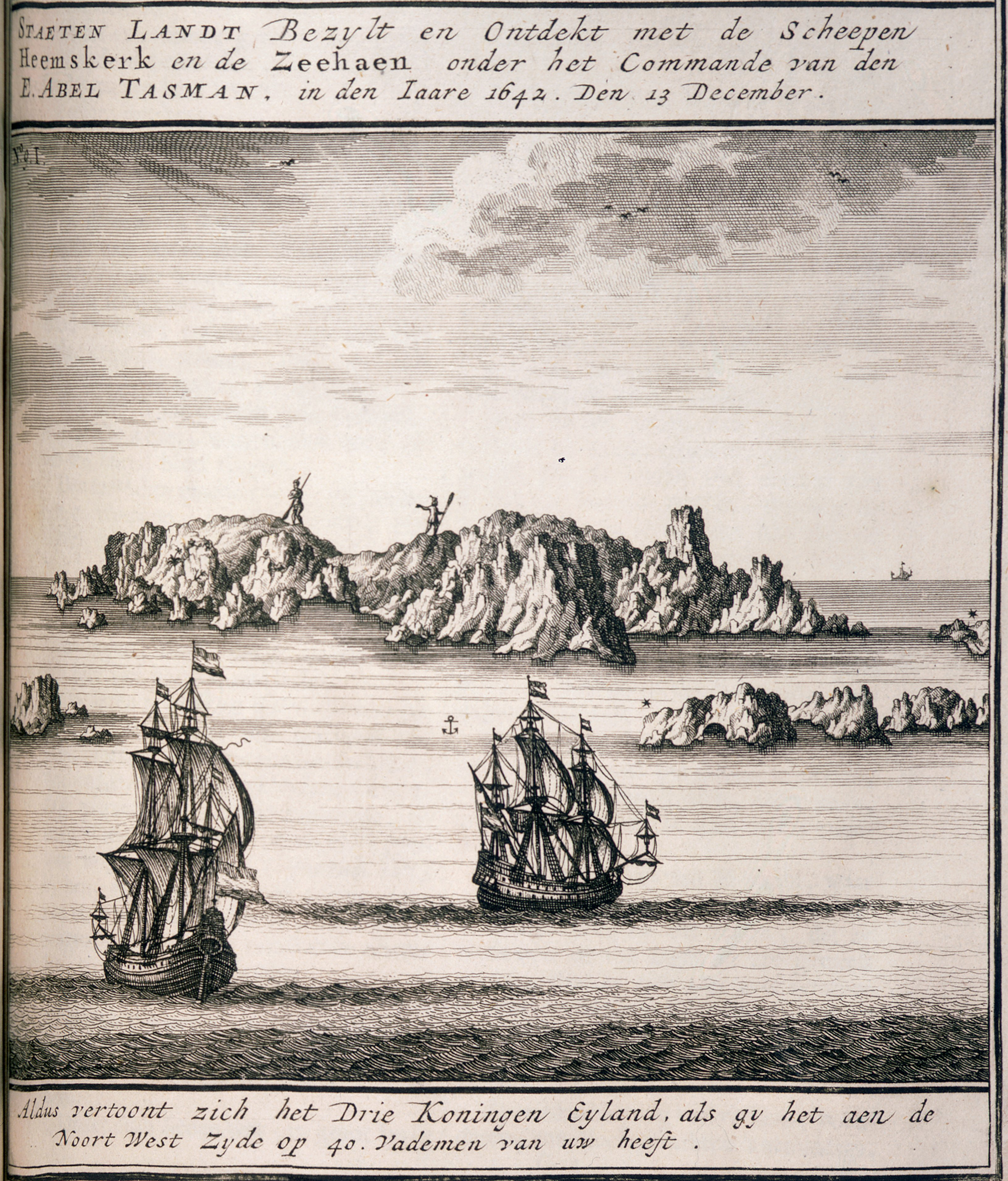 Aldus vertoont zich het Drie Koningen Eyland, als gy het aen de Noort west Zyde op 40 Vaedemen van uw heeft.